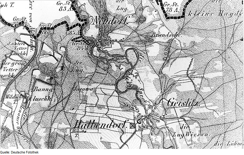 Original image description from the Deutsche Fotothek Guttau-Halbendorf/Spree. Oberreit, Sect. Bautzen, 1844/46